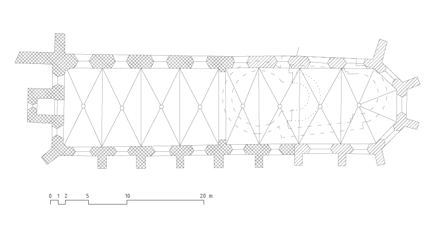 Půdorys